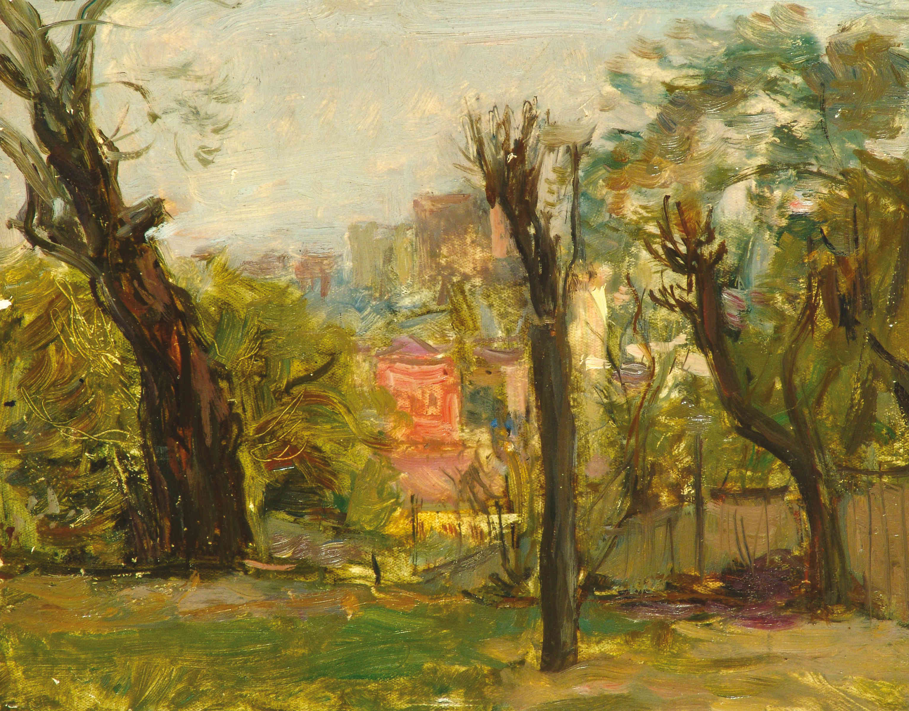 Панадворак Зевін Леў, 1940 г. Кардон, алей 19×24,4 см Нацыянальны мастацкі музей Рэспублікі Беларусь